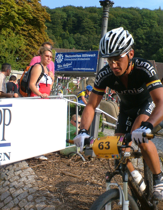 Foto von mir selbst erstellt..